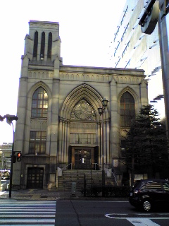 横浜指路教会 Shiloh church in Yokohama, Japan.